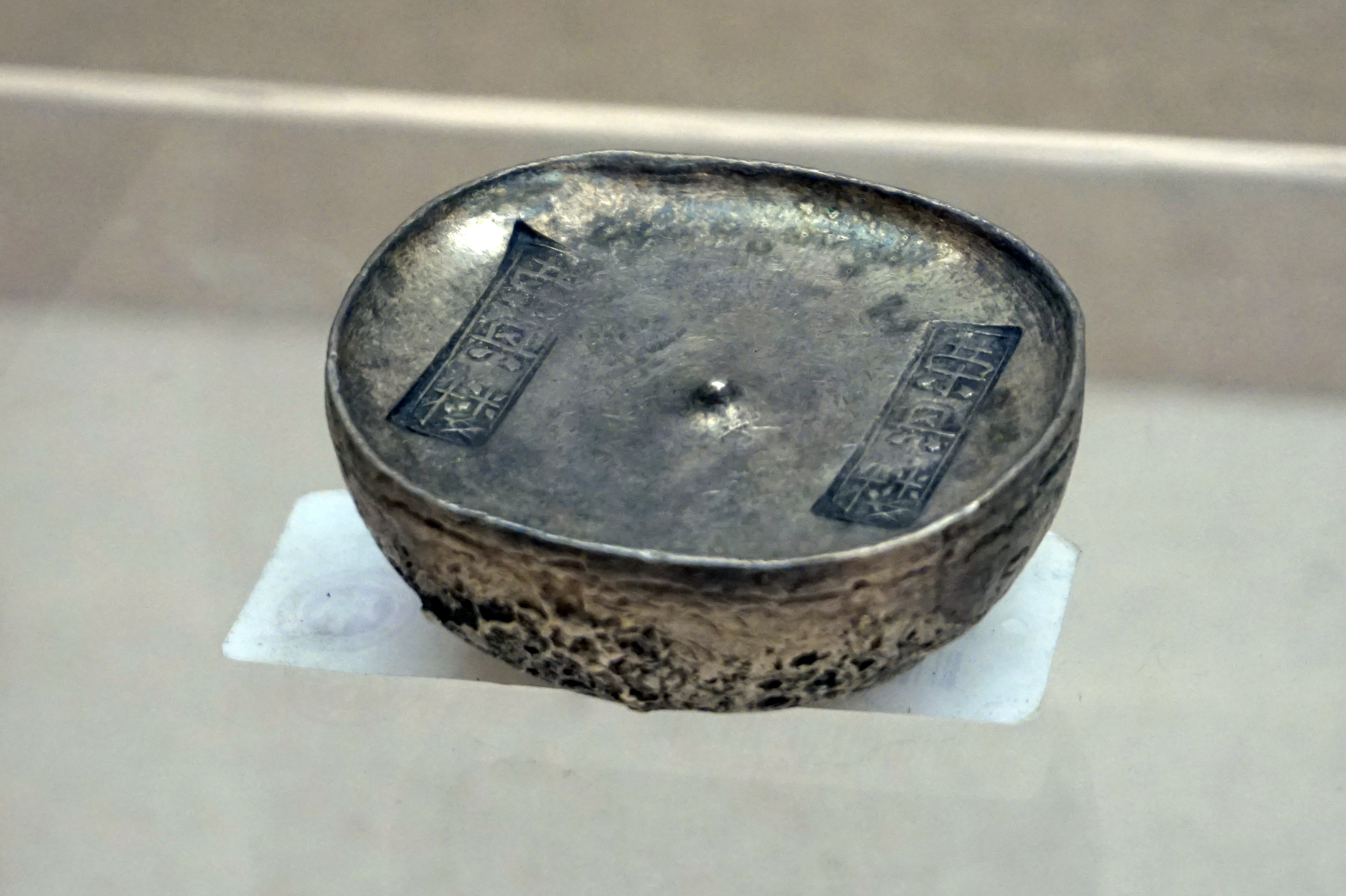 清四川“荣兴楼”十两银锭。中国财税博物馆藏。